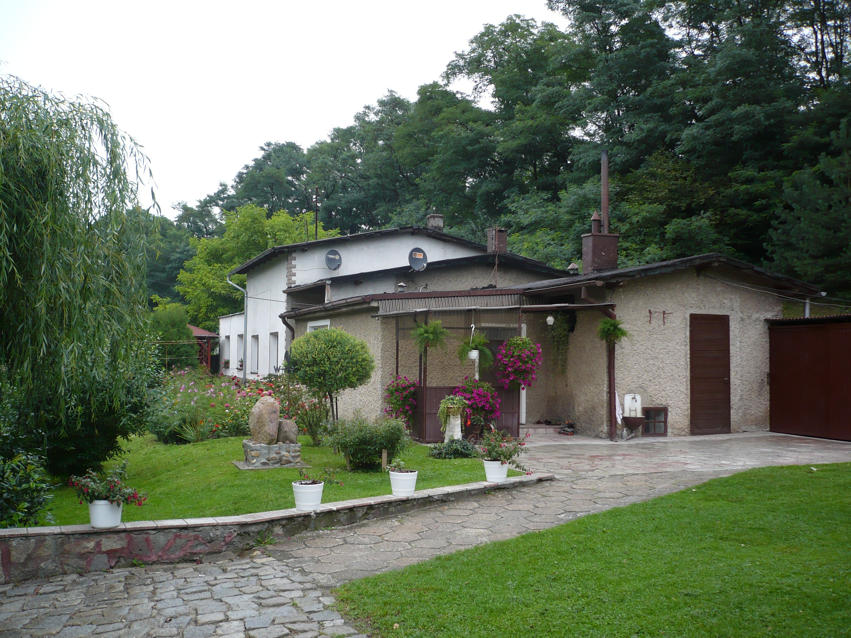 Budova železniční stanice Kałków (Kalkau) přestavěná na rodinný domek.